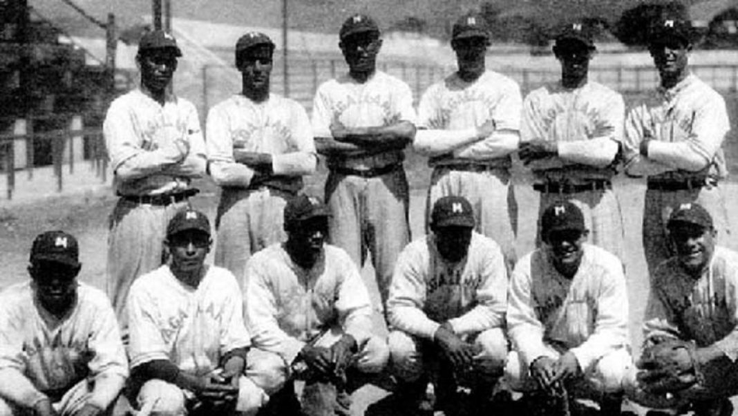 Magallanes en la década 1930/ Foto: Rafael Lairet